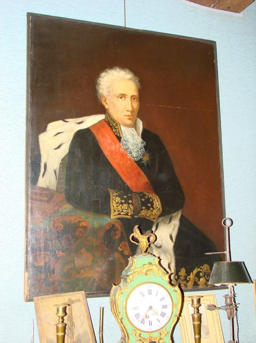 Photographie d'un tableau de Francois de Barthélémy